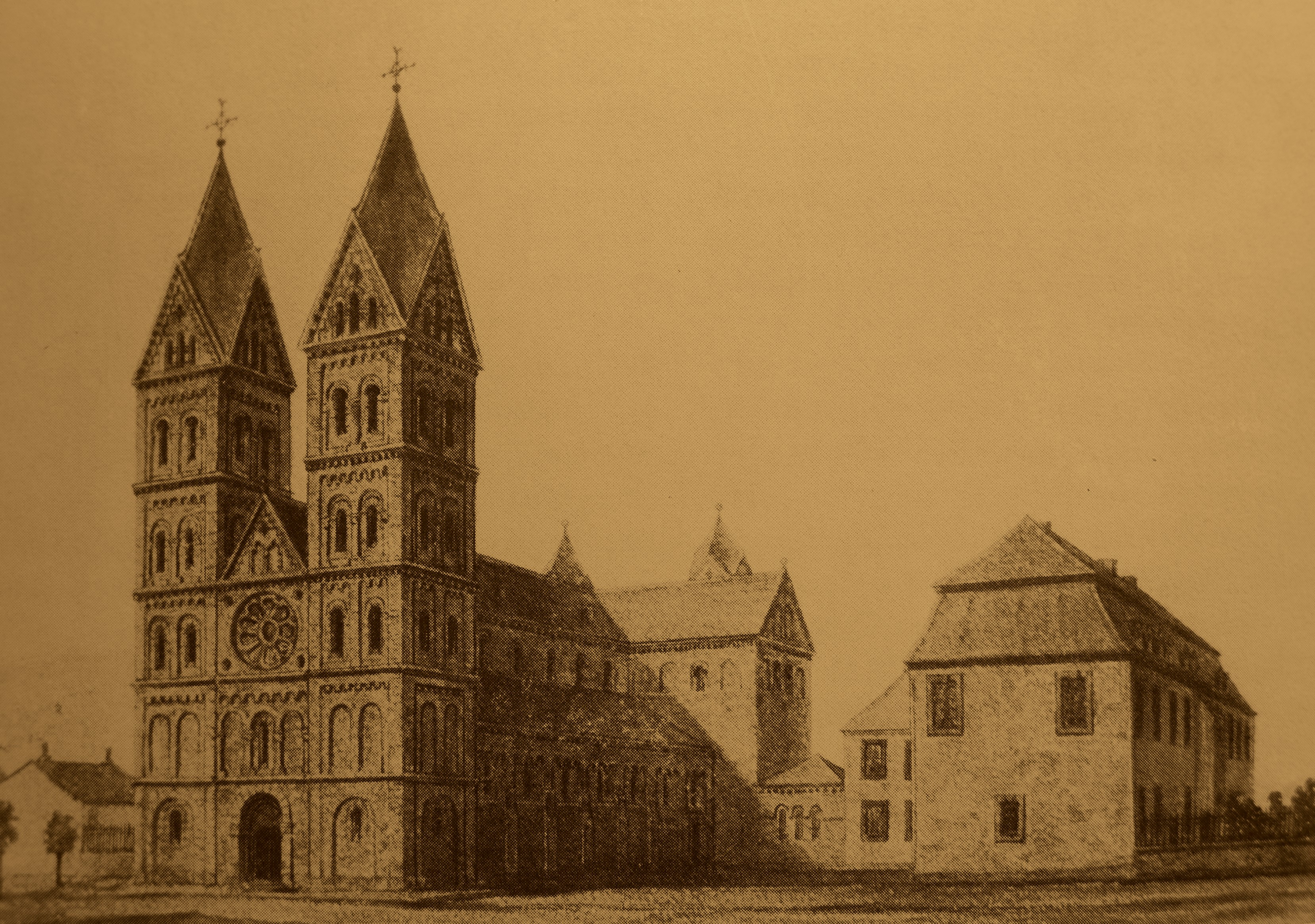 St. Peter in Merzig, Entwurf einer neoromanischen Zweiturmfassade nach dem Vorbild von Andernach, 1894, Architekt Brecht (Archiv Staatliches Konservatoramt Saarbrücken)